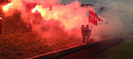 Godøyveggen blusser ved innmarsj borte i en seriekamp mot Skodje i 2014